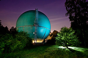 Der Gasbehälter an der Tunnelstraße in Solingen wird zum Galileum Solingen umgebaut.